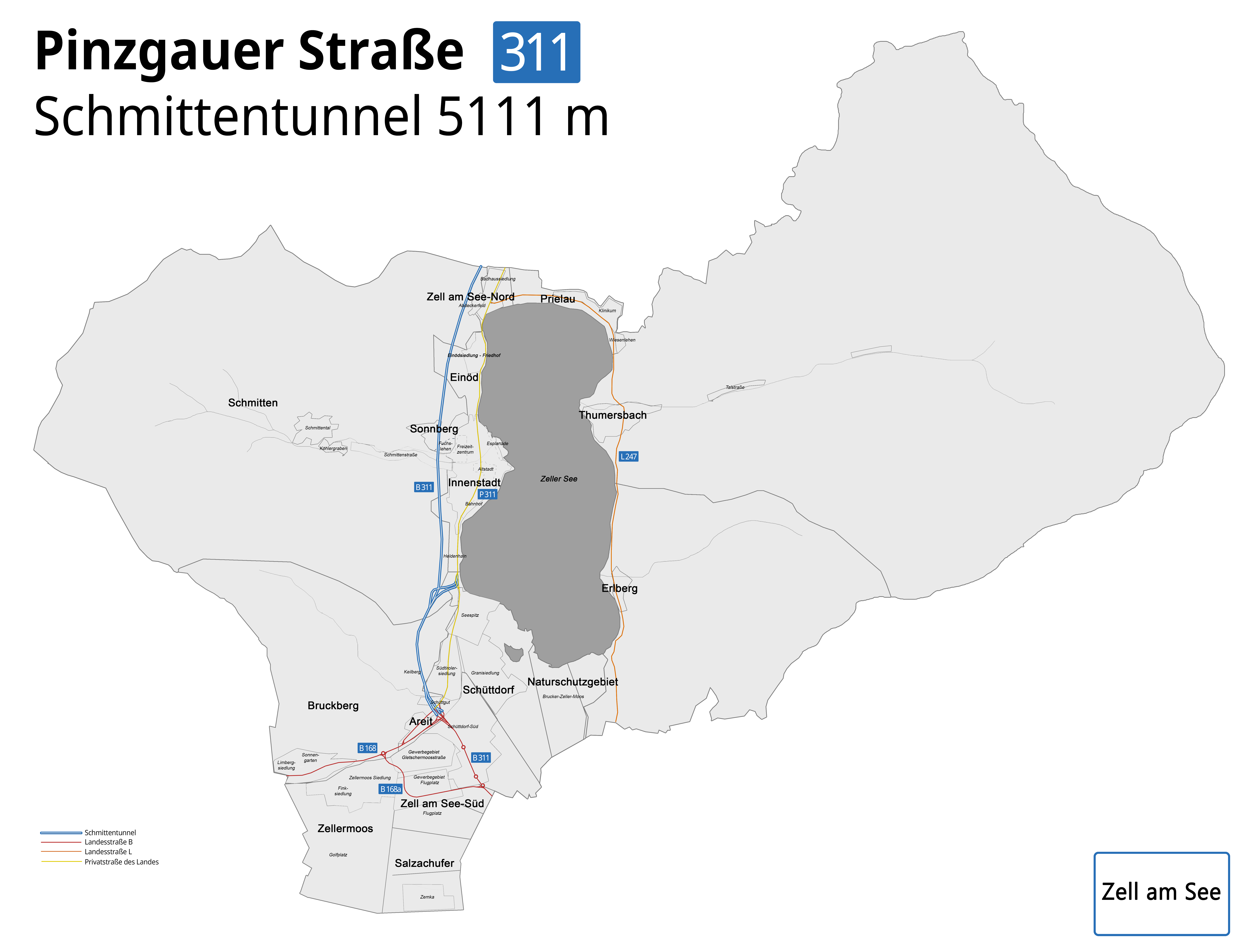 Schmittentunnel